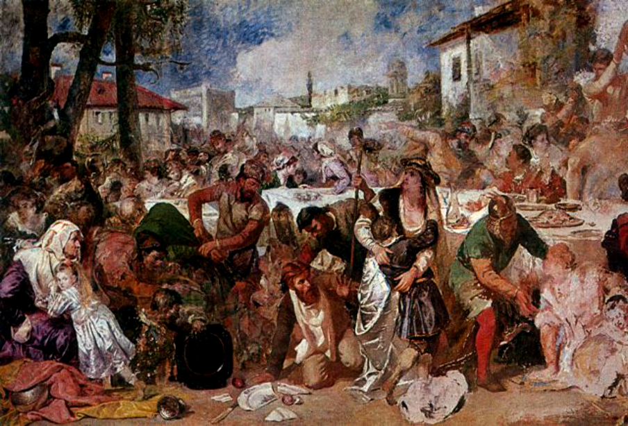 Boierii surprinşi la ospăţ de trimişii lui Vlad Ţepeş